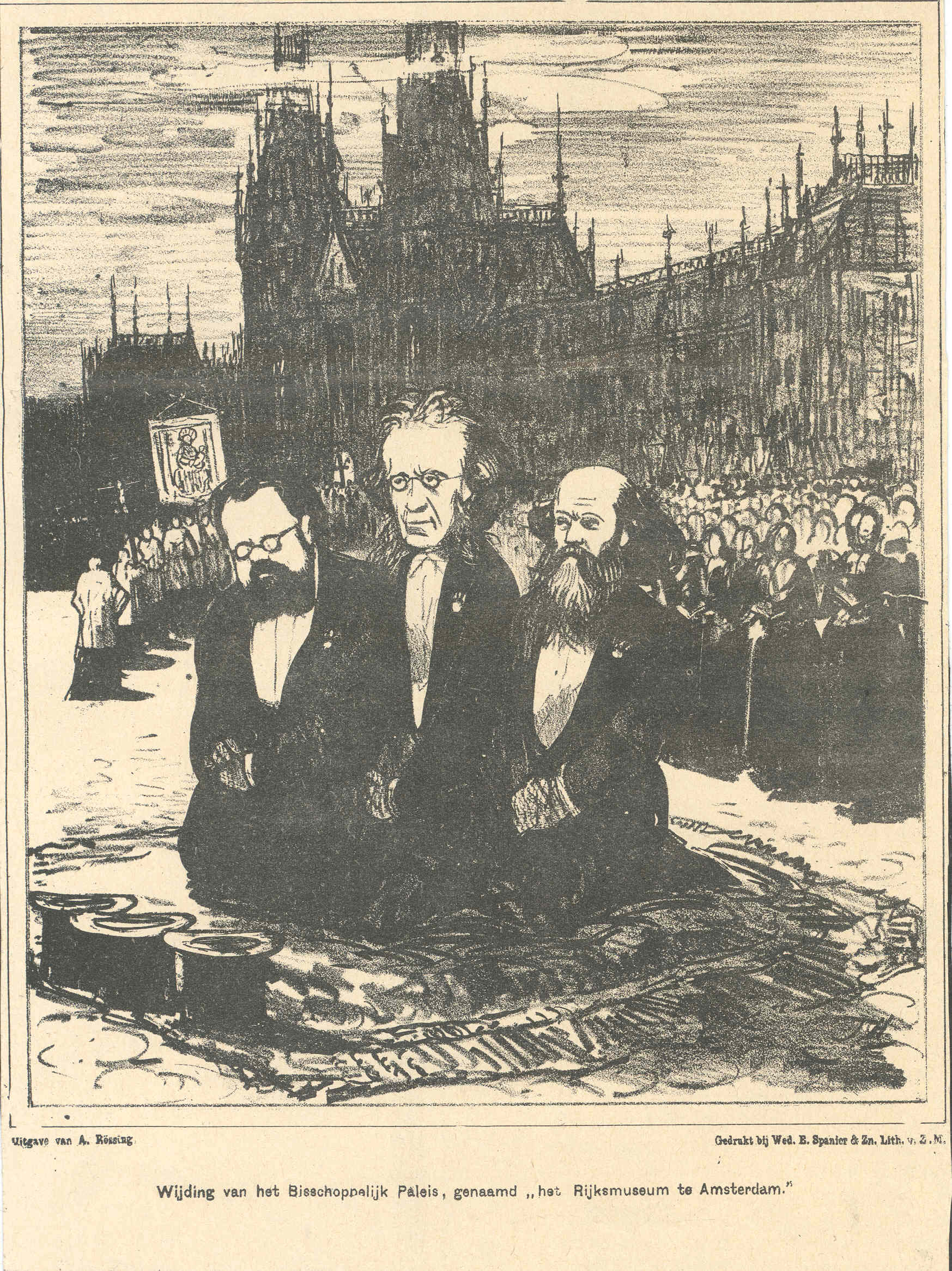 Reproductie van de litho Wijding van het Bisschoppelijk Paleis, genaamd „het Rijksmuseum te Amsterdam” van Jan Holswilder. Drukwerk. 20 × 14.5 cm (7.9 × 5.7 in). Roermond, Cuypershuis (0662/9).